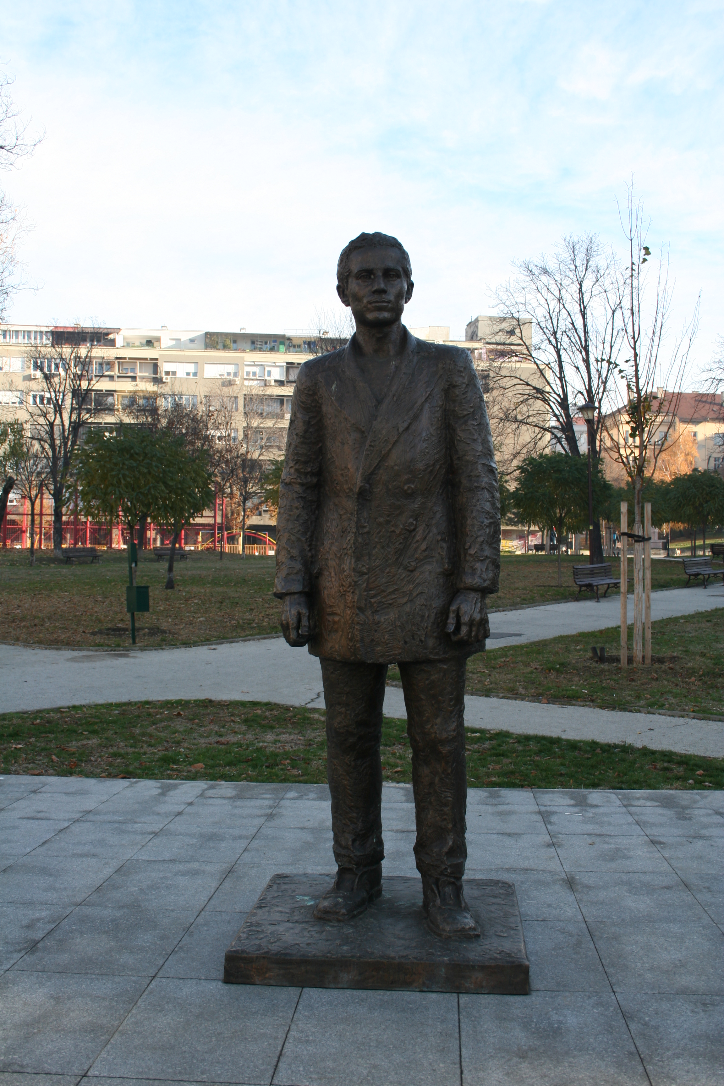 Spomenik Gavrilu Principu u Beogradu